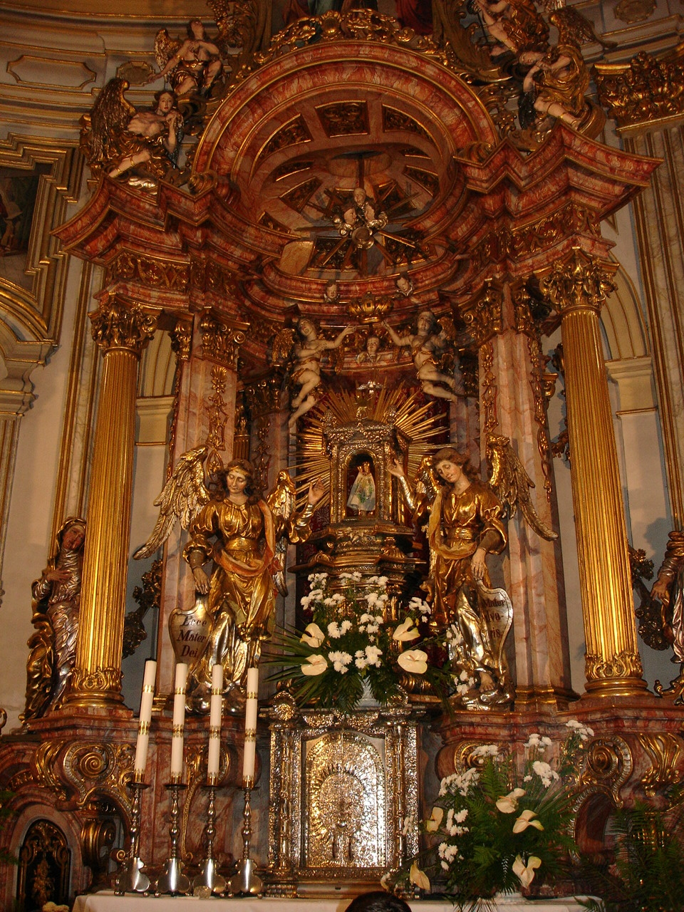 Hauptaltar der Wallfahrtskirche Wambierzyce (Albendorf)